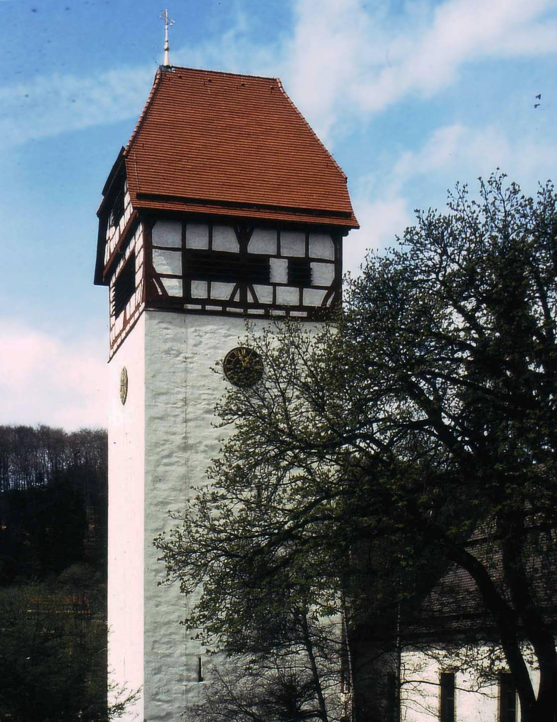 Turm der evang. Peterskirche in Albstadt Tailfingen